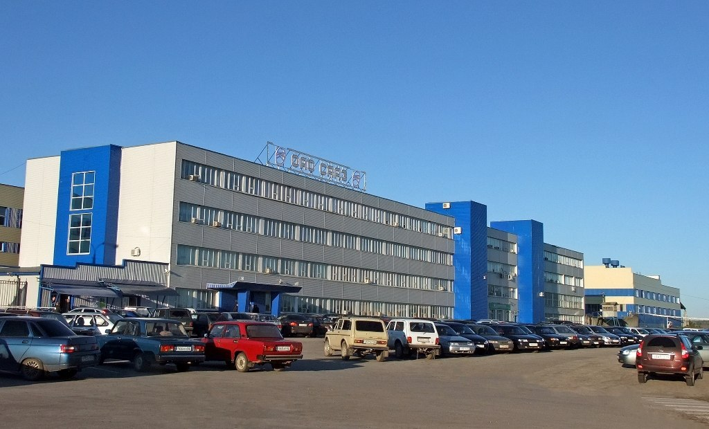 ОАО "СААЗ". Общий вид, 2012 год Автор фото - Андрей Серёгин